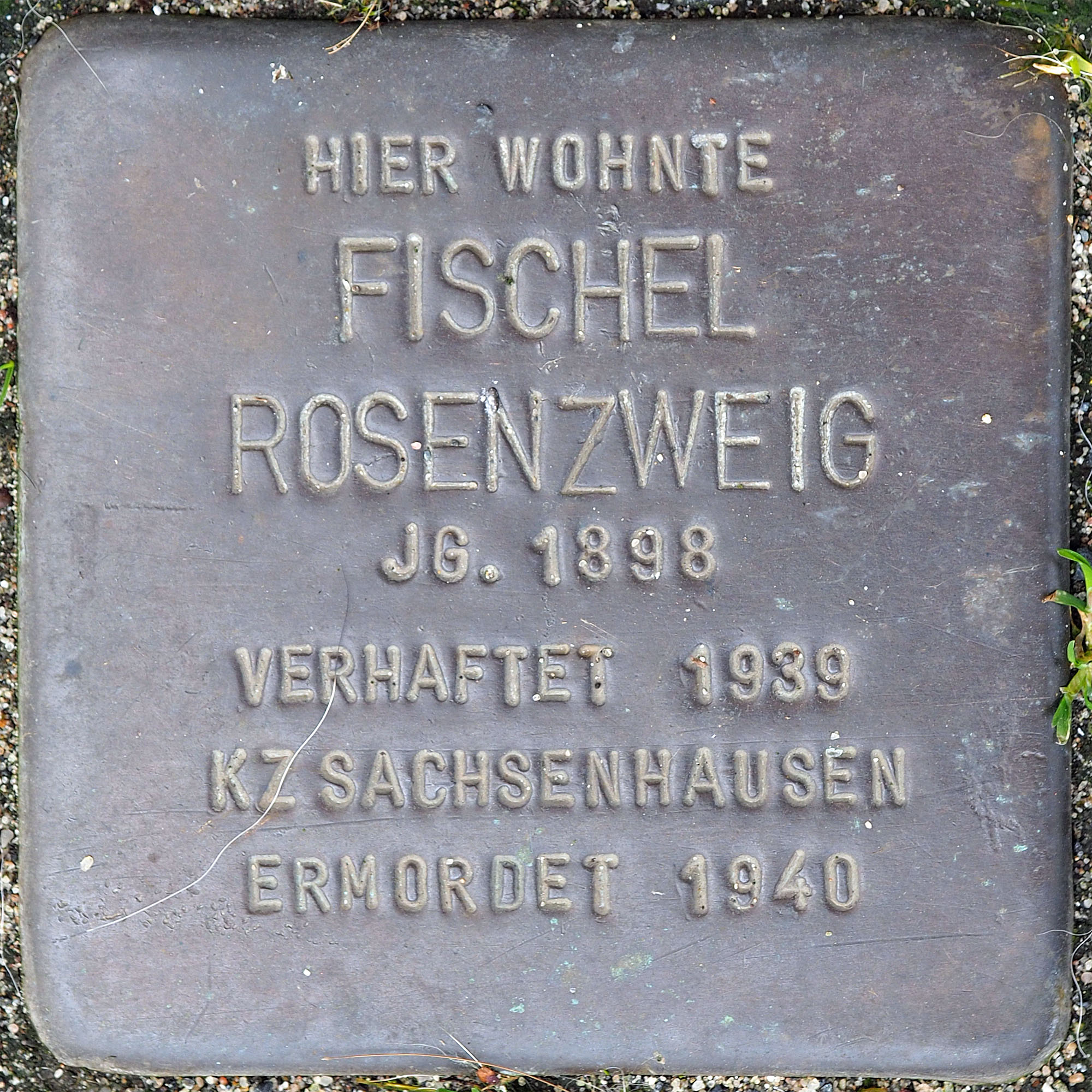 Stolpersteine MG: Rosenzweig, Fischel